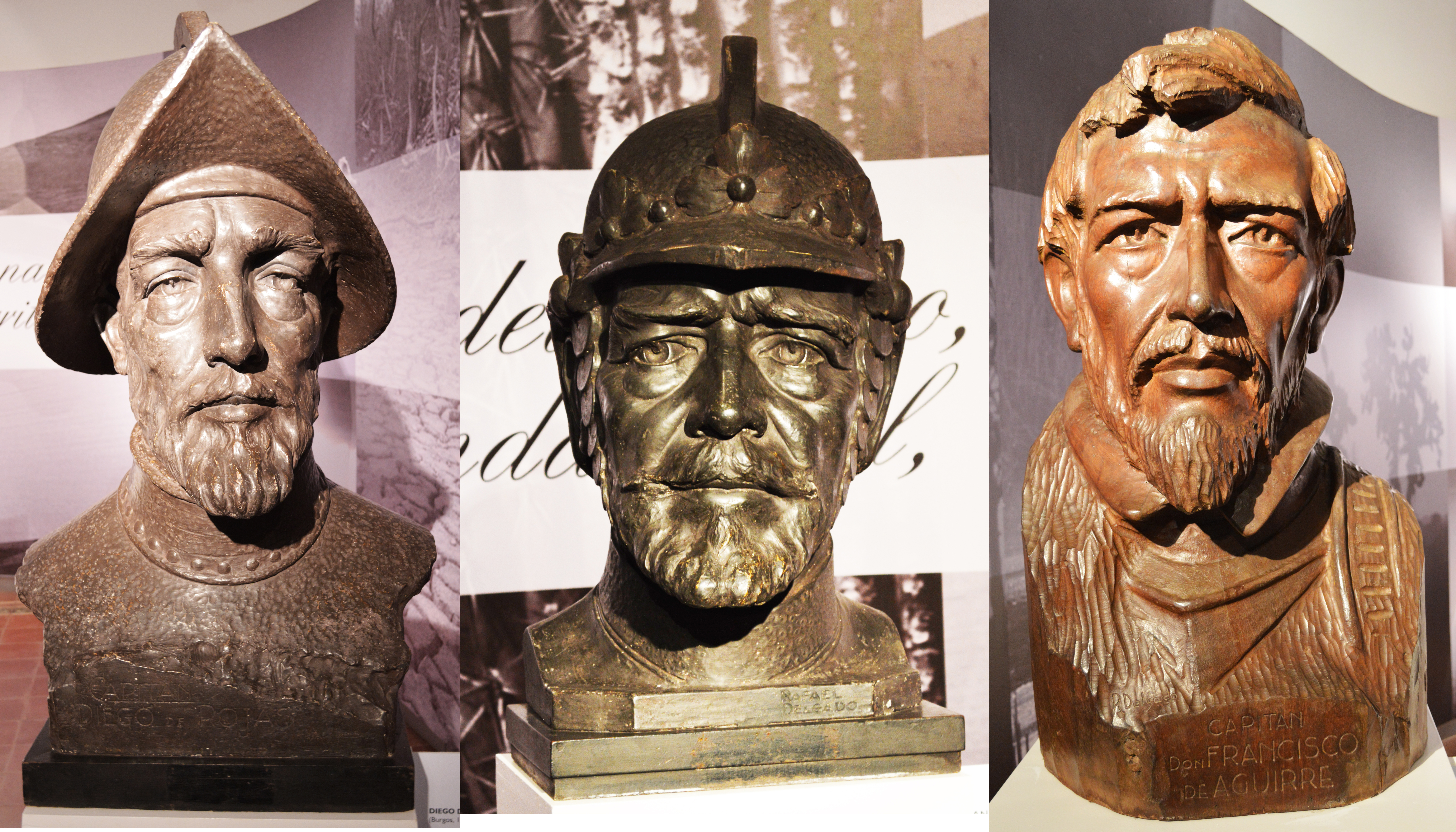 De izquierda a derecha, busto de los capitanes Diego de Rojas, Juan Núñez de Prado y Francisco de Aguirre. Se destacan por haber explorado, conquistado y colonizado el actual terrritorio del Noroeste Argentino.